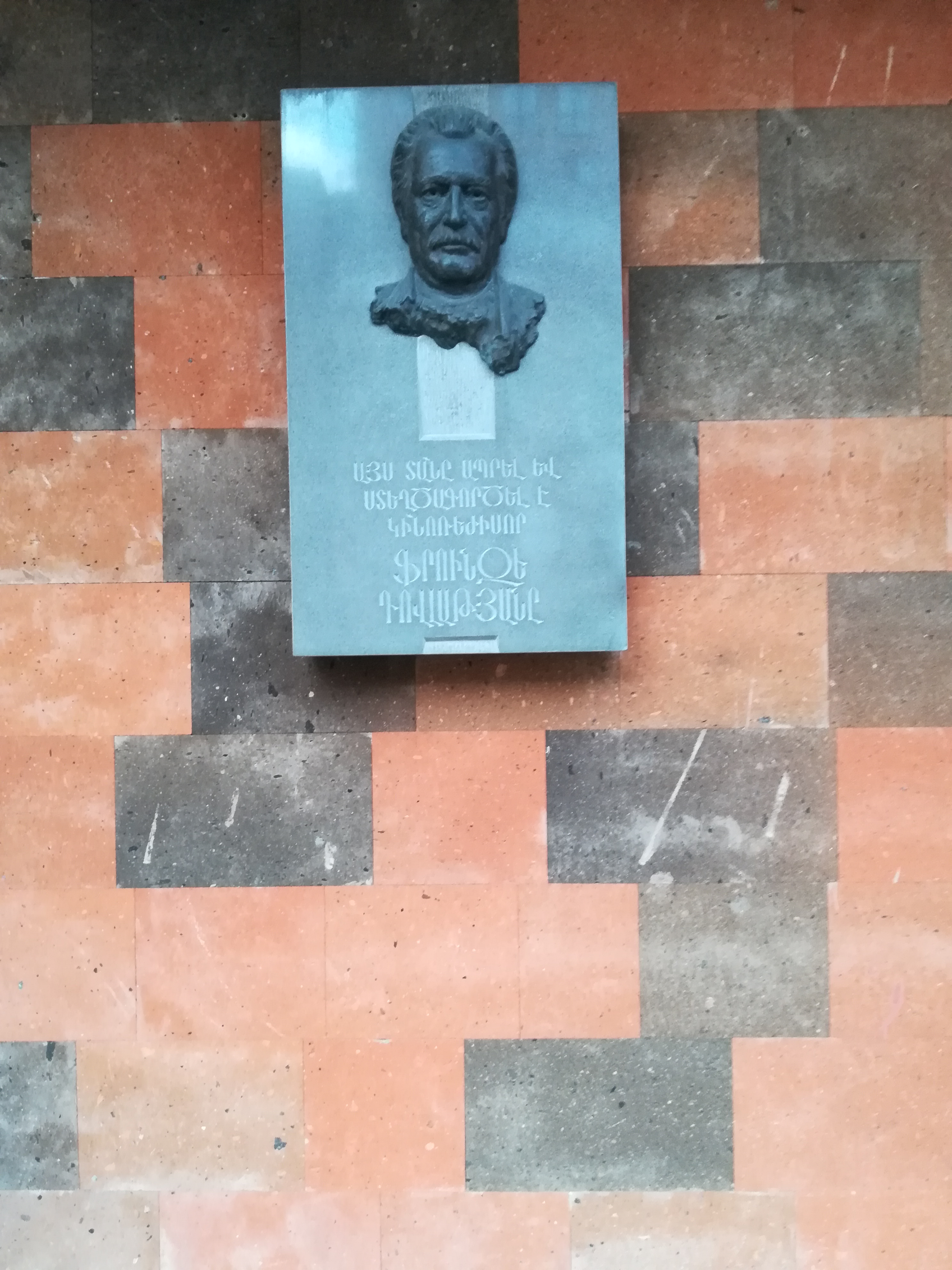 Ереван